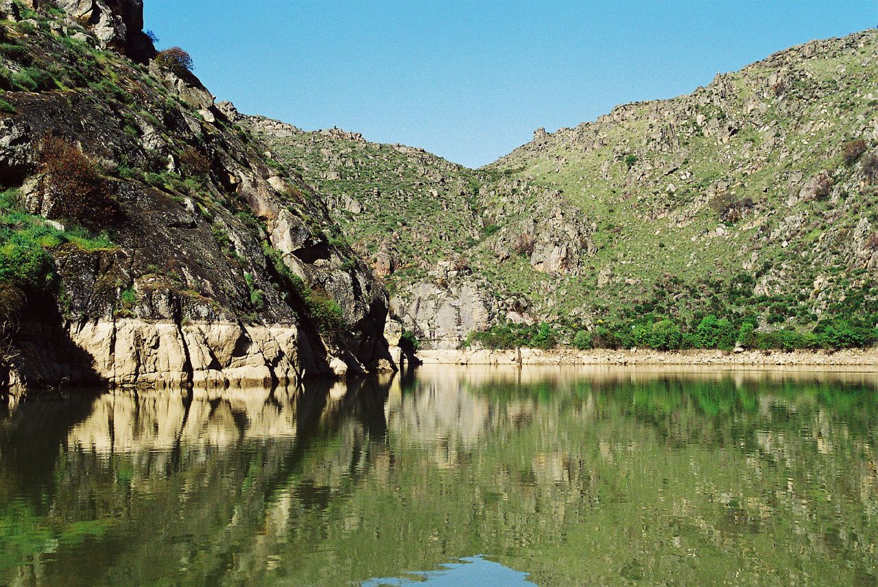 Rio Douro Internacional - Portugal